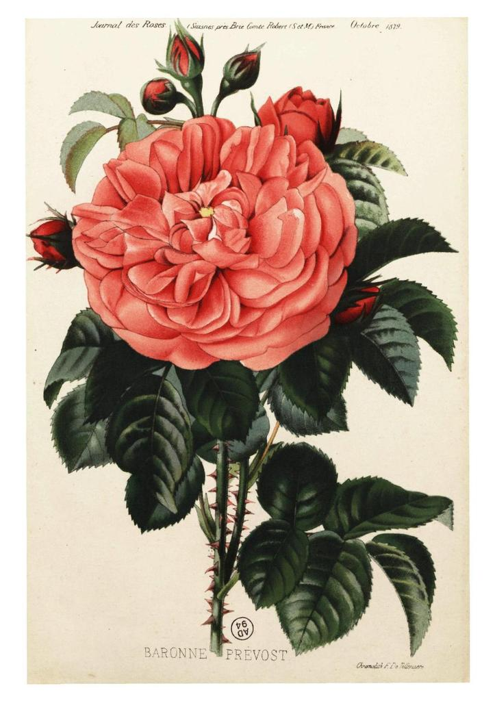 Rose 'Baronne Prévost' (1841 Desprez), in Journal des roses, n°10, octobre 1879.